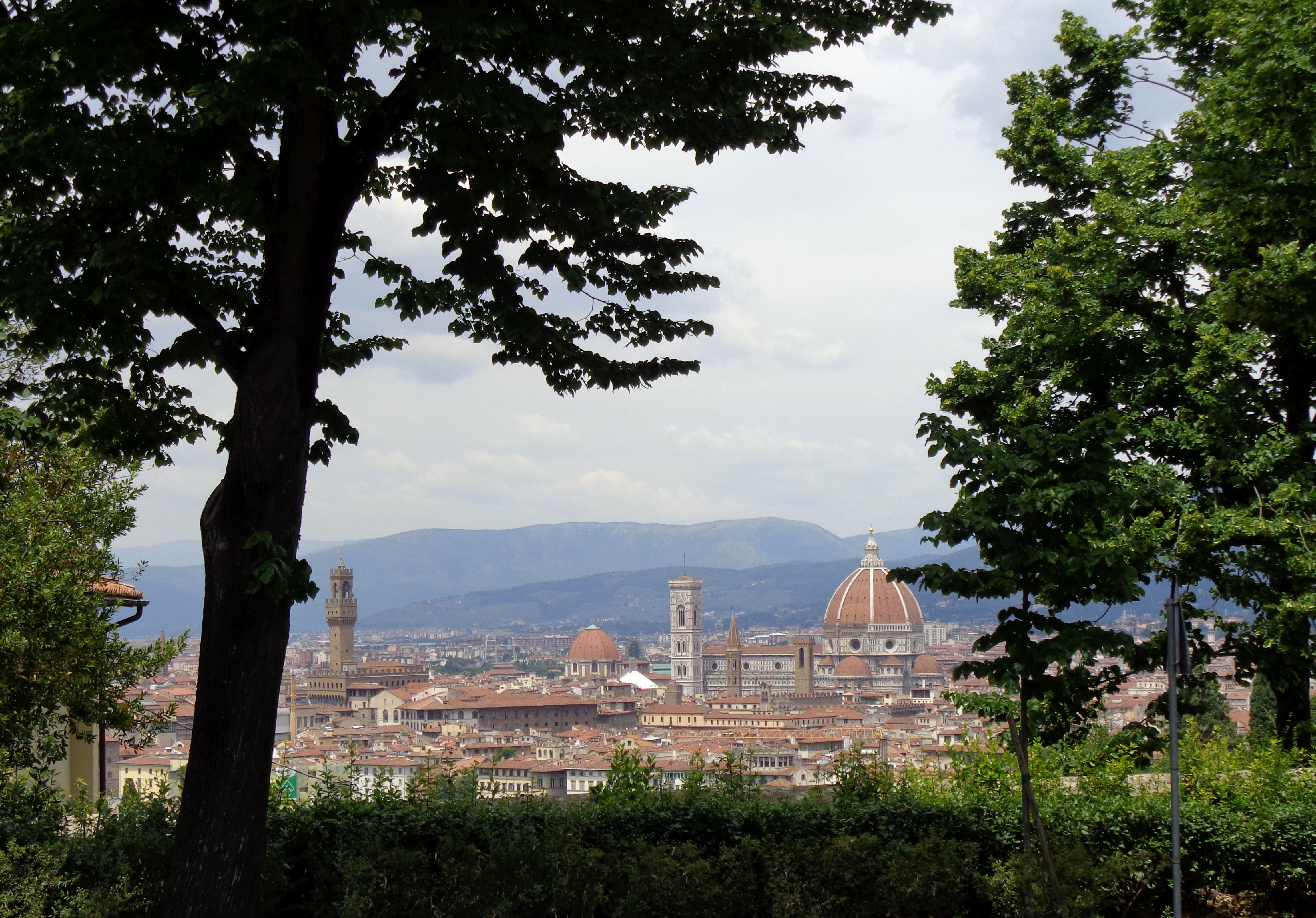 Panorama della città di Firenze